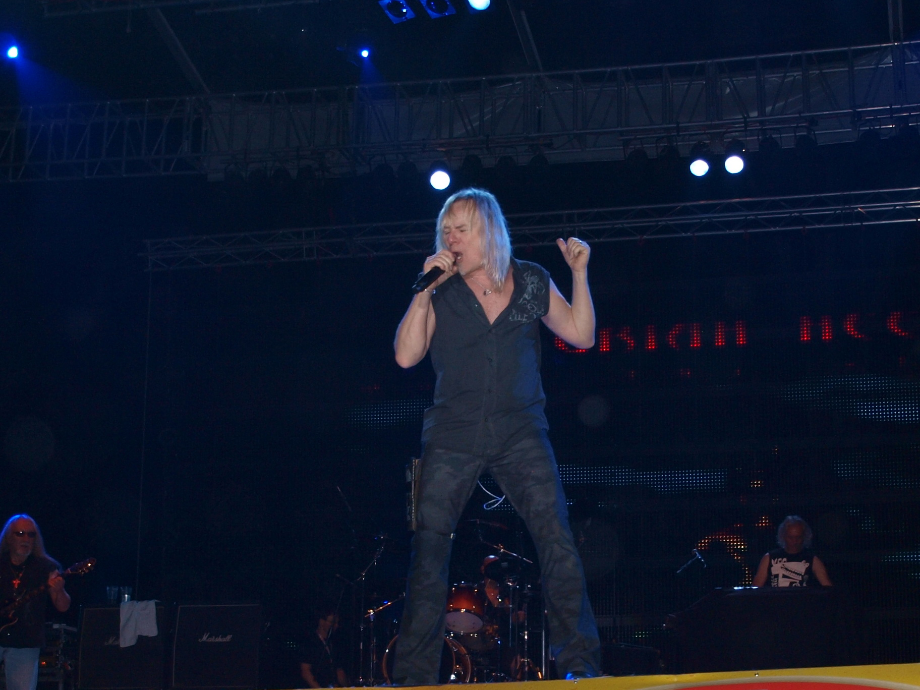 Uriah Heep na Mega Bikers susretima u Slavonskom Brodu, 9. svibnja 2009. godine.